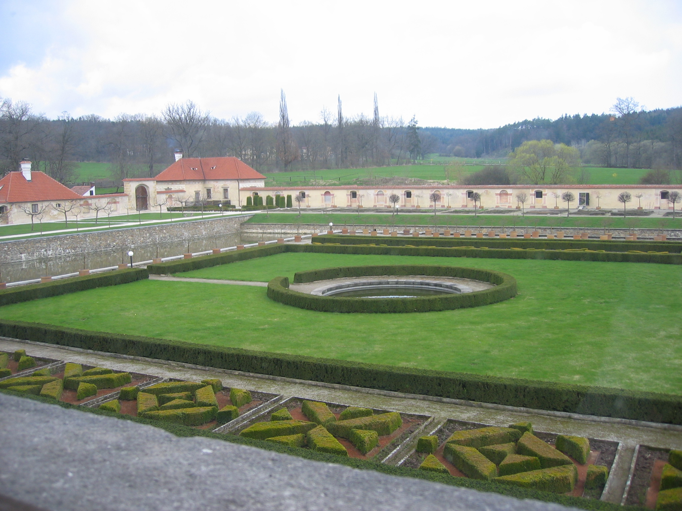 zámek Kratochvíle - zahrada a vodní příkop